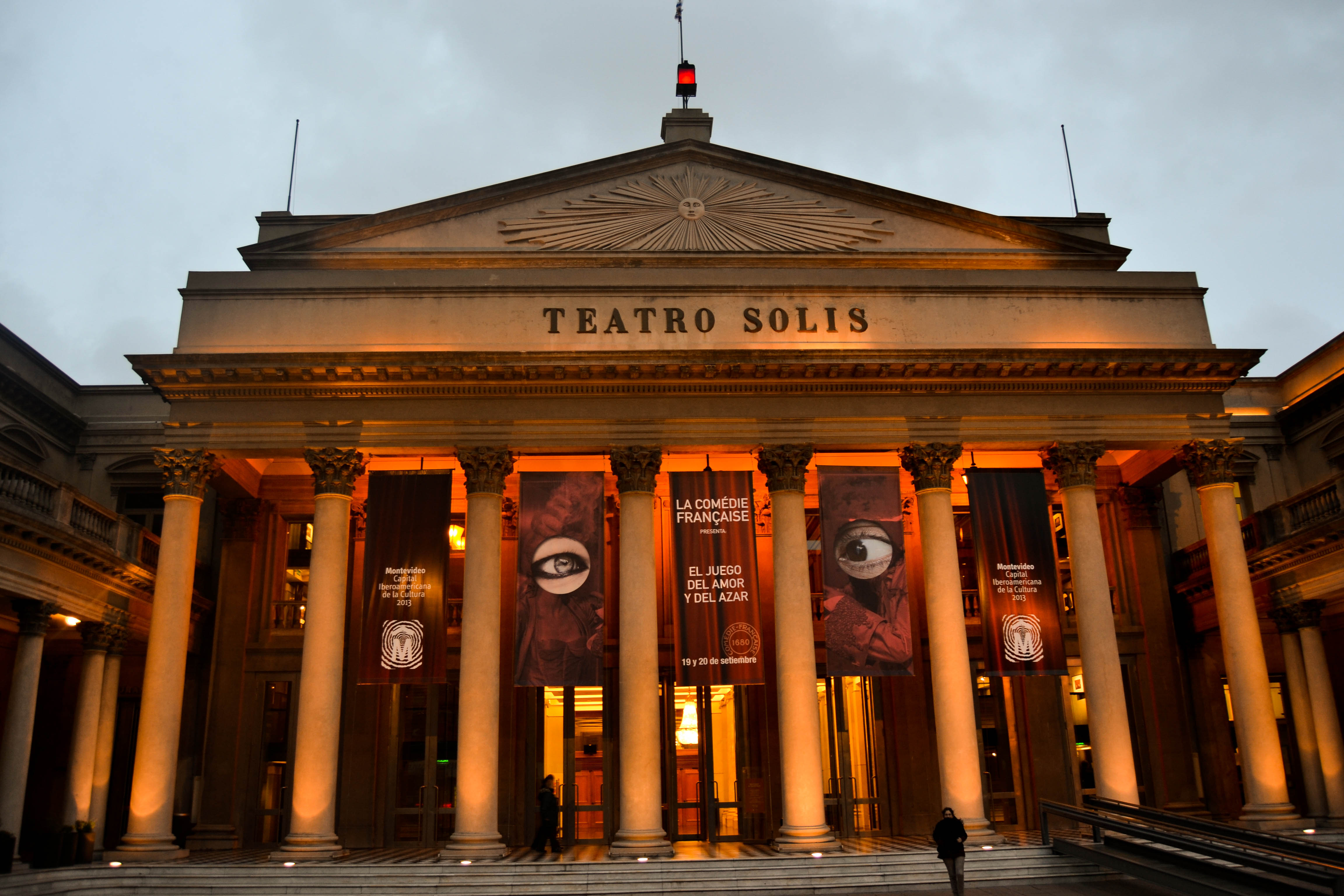 Teatro Solís. Ubicada en el departamento de Montevideo